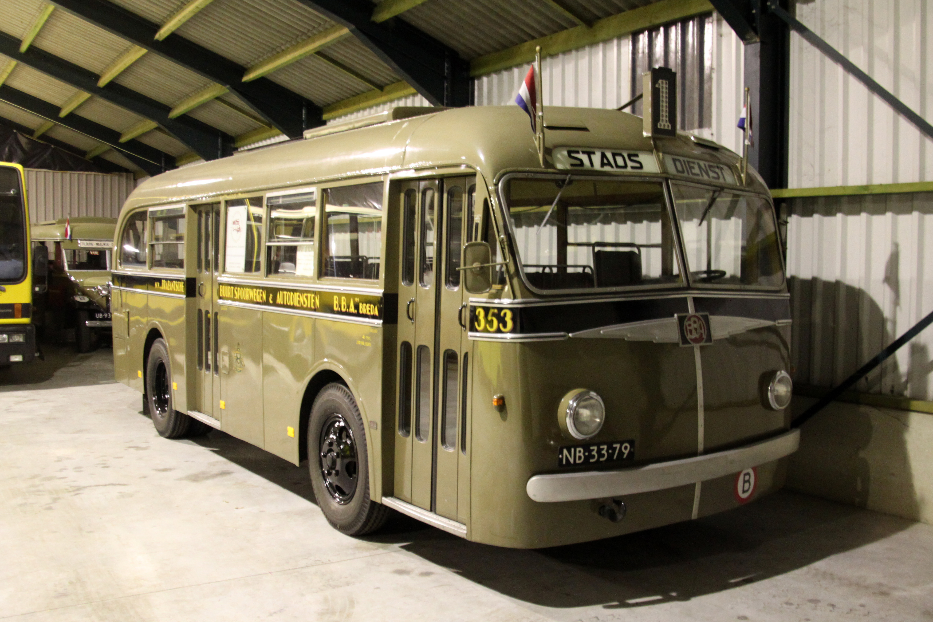 BBA bus 353 van het type Ford 59B / Jongerius van de Stichting Veteraan Autobussen, een vroegere stadsbus van de BBA.